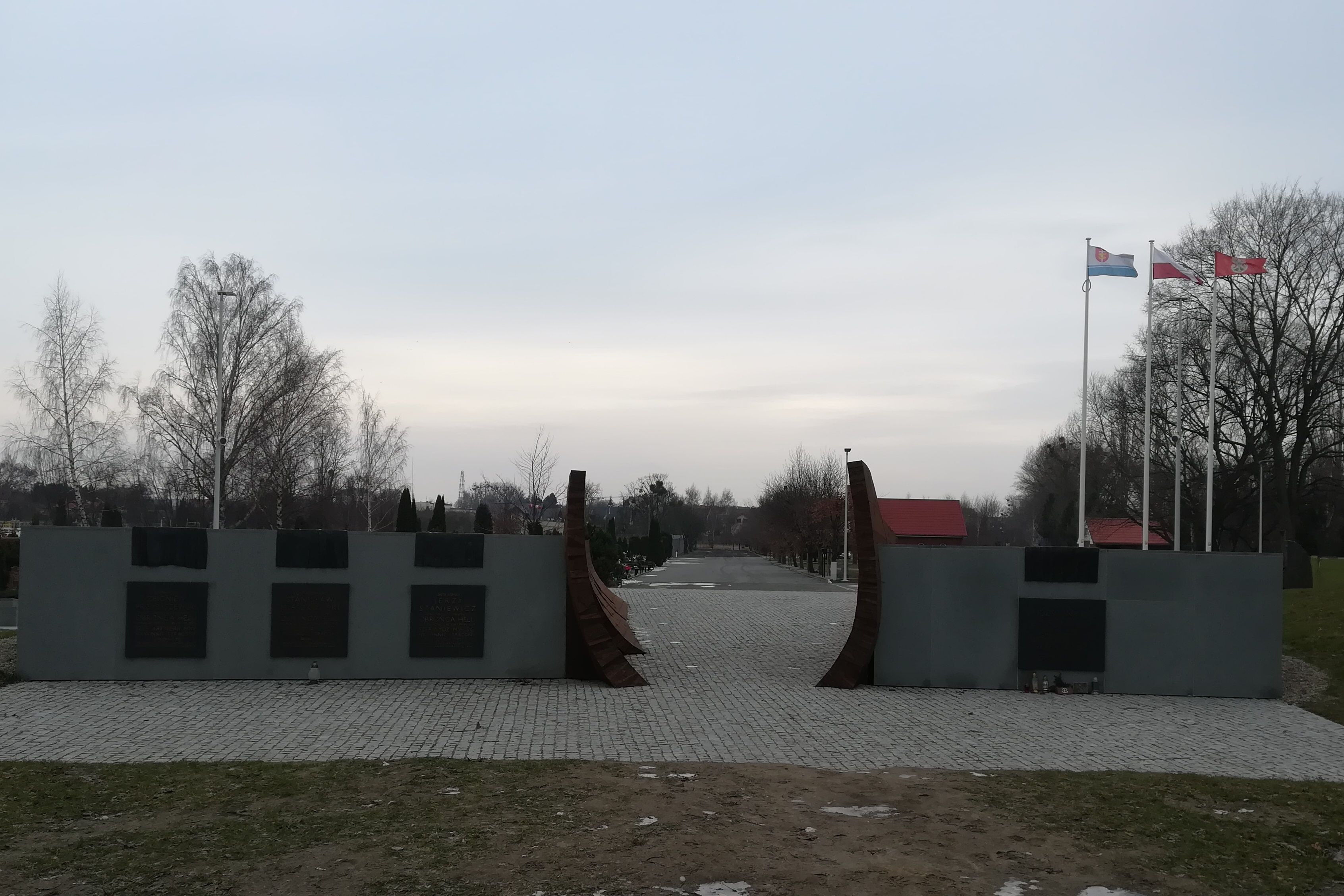 Cmentarz Marynarki Wojennej_Kwatera Pamięci_04